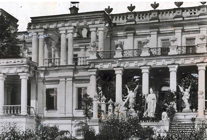 Усадьба Степановское (Павлищево) в Юхновском уезде